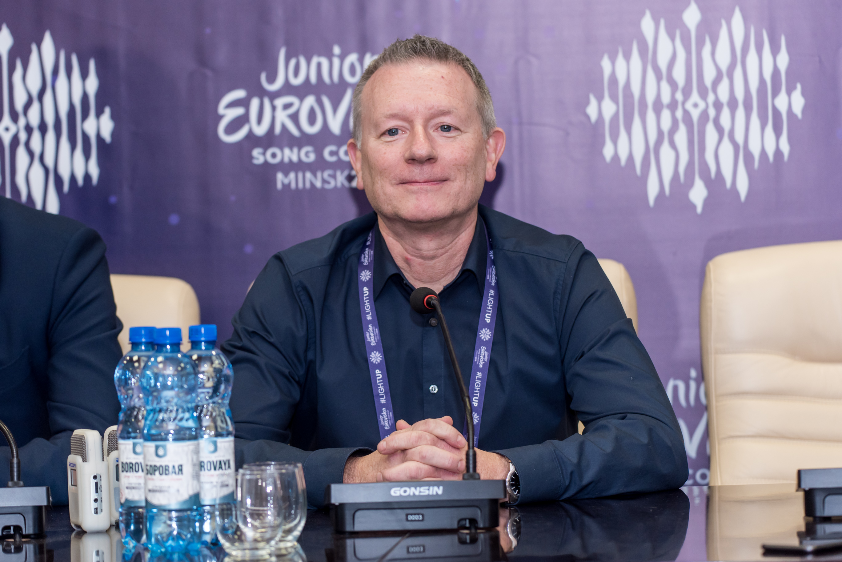 Юн Ула Санн на пресс-конференции Детского Евровидения 2018.